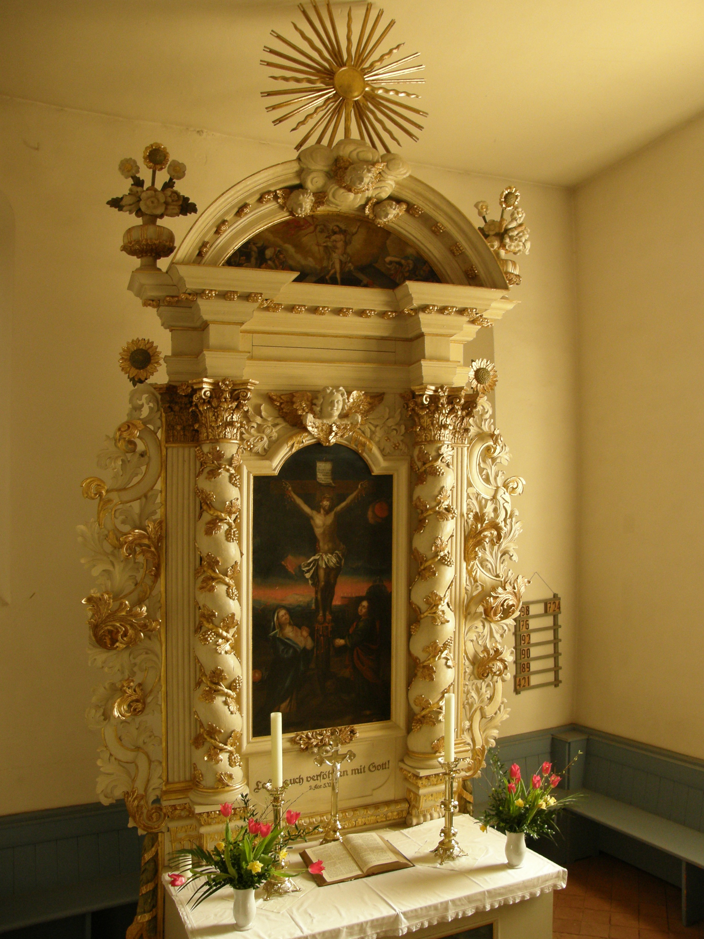 Berlin-Mahlsdorf, Hönower Str., alte Pfarrkirche, innen